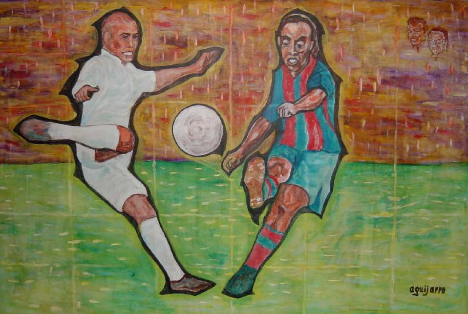 Dos de las más rutilantes estrellas del fútbol mundial se enfrentan en las competiciones españolas, tras llegar de su común país de origen, el mítico pentacampeón Brasil. En el palco, los presidentes que hicieron posible este encuentro antológico, Florentino Pérez y Joan Laporta, del Real Madrid y del F.C. Barcelona respectivamente, disfrutan la emoción de su deportiva rivalidad. "Fútbol Antología - Ronaldo versus Ronaldinho", por Aguijarro (Antonio Guijarro Morales), pintor y cardiólogo natural de Guadix (Granada) == Título del enlace: Pinturas de Aguijarro ==